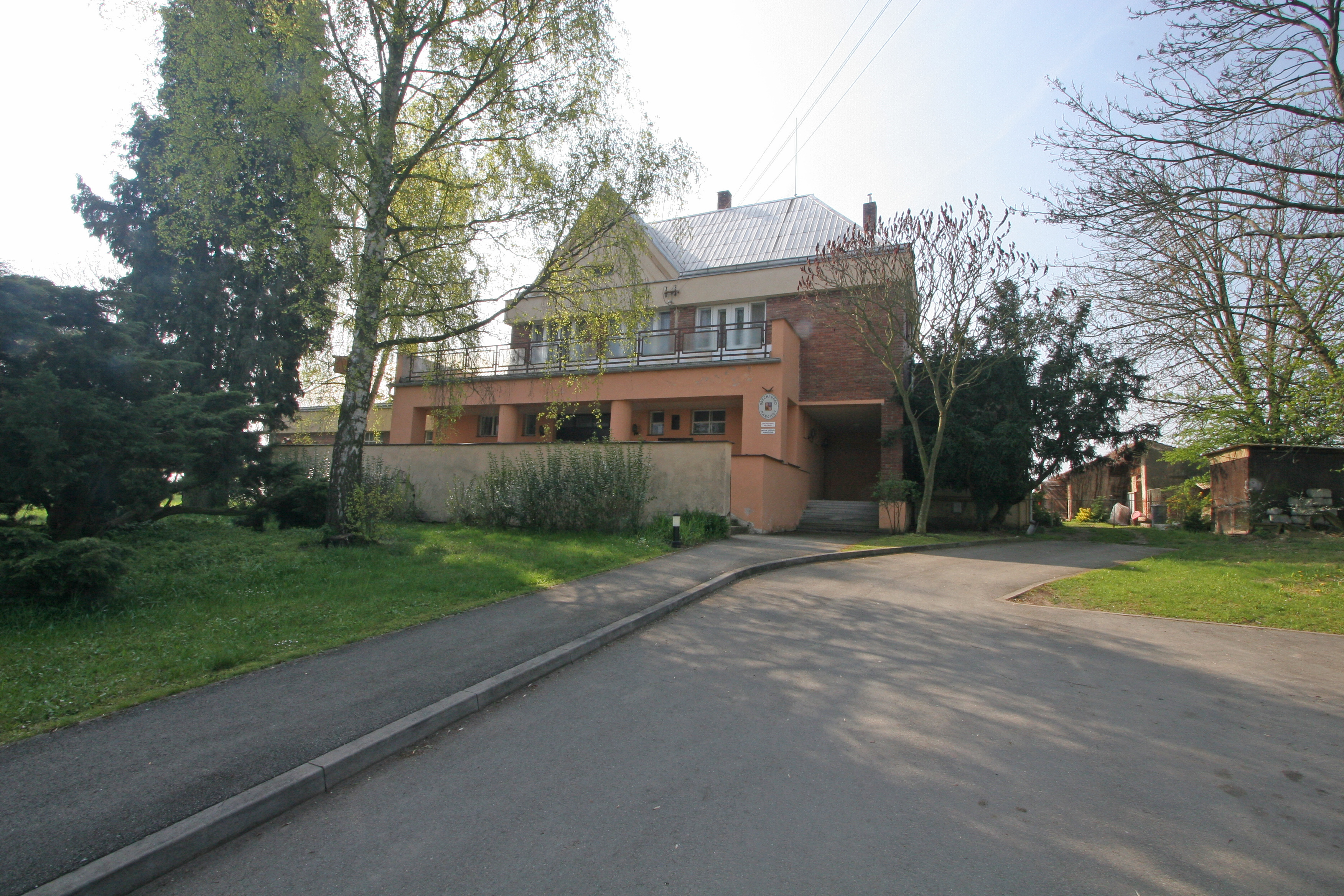 Barchov obecní úřad